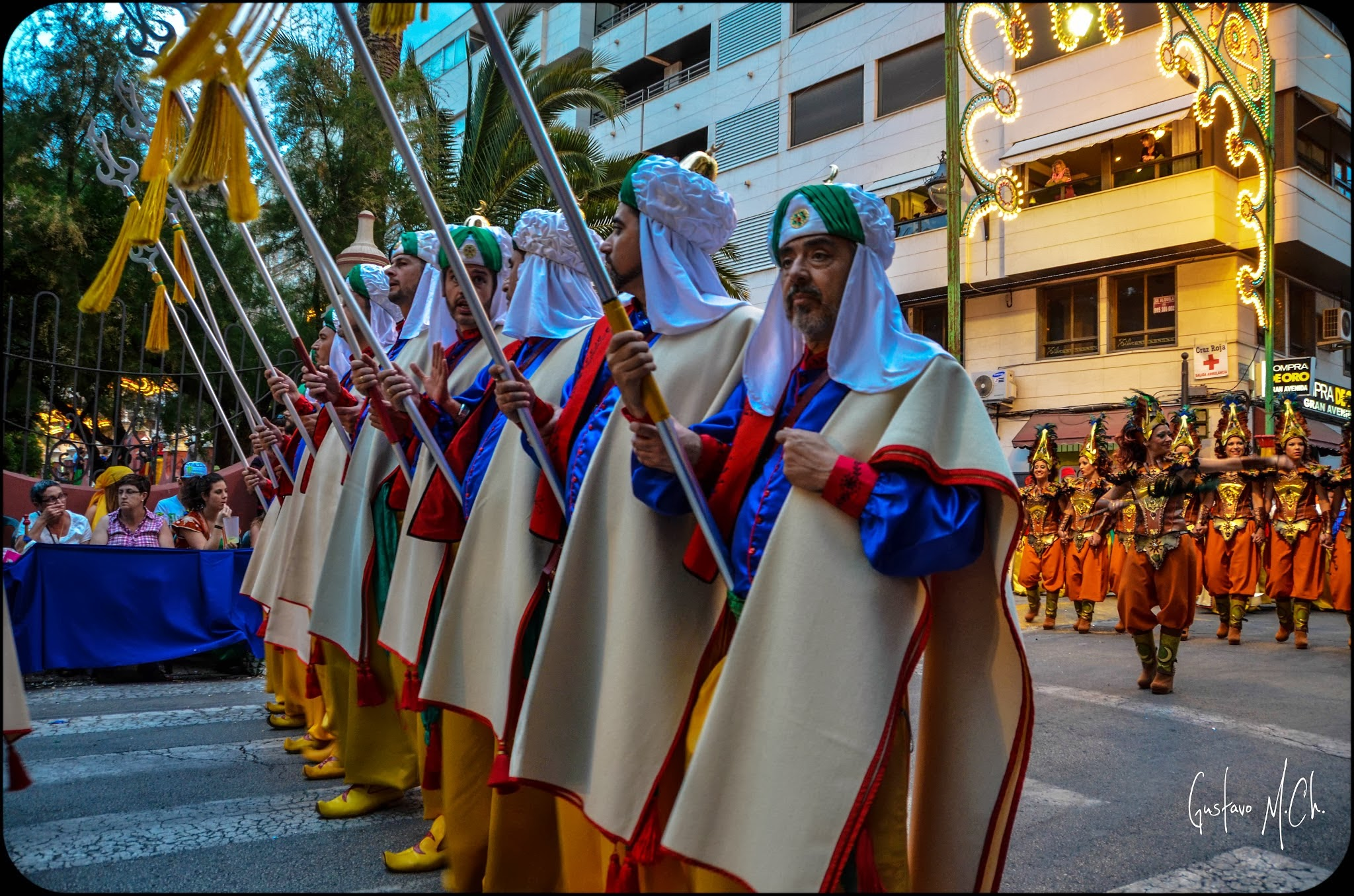 Moros y Cristianos Elda 2013